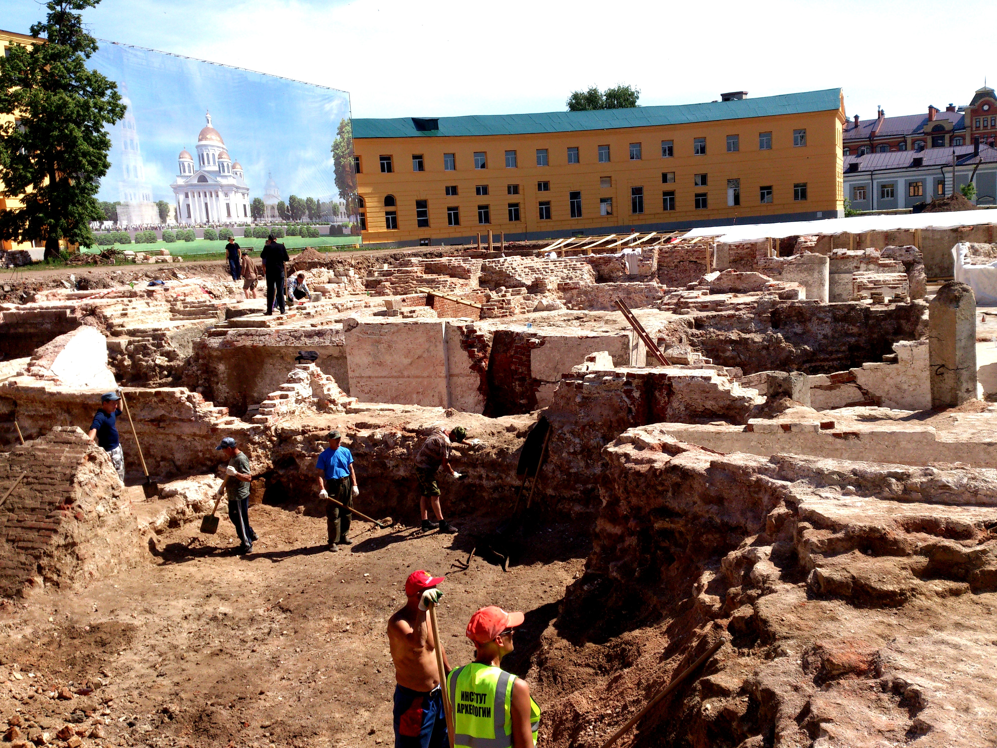 Раскопки в Казанском Богородицком монастырена месте, где находился собор Казанской иконы Божией Матери (25 мая 2016 года).